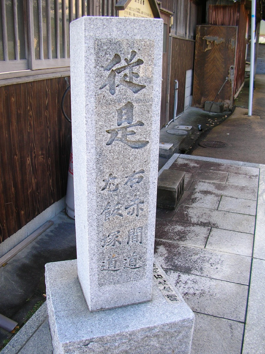 木屋瀬宿追分道標レプリカ（平成8年設置） 長崎街道と唐津街道の分岐点を示す